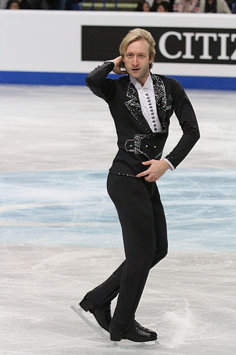 Евгений Плющенко на чемпионате Европы по фигурному катанию 2012